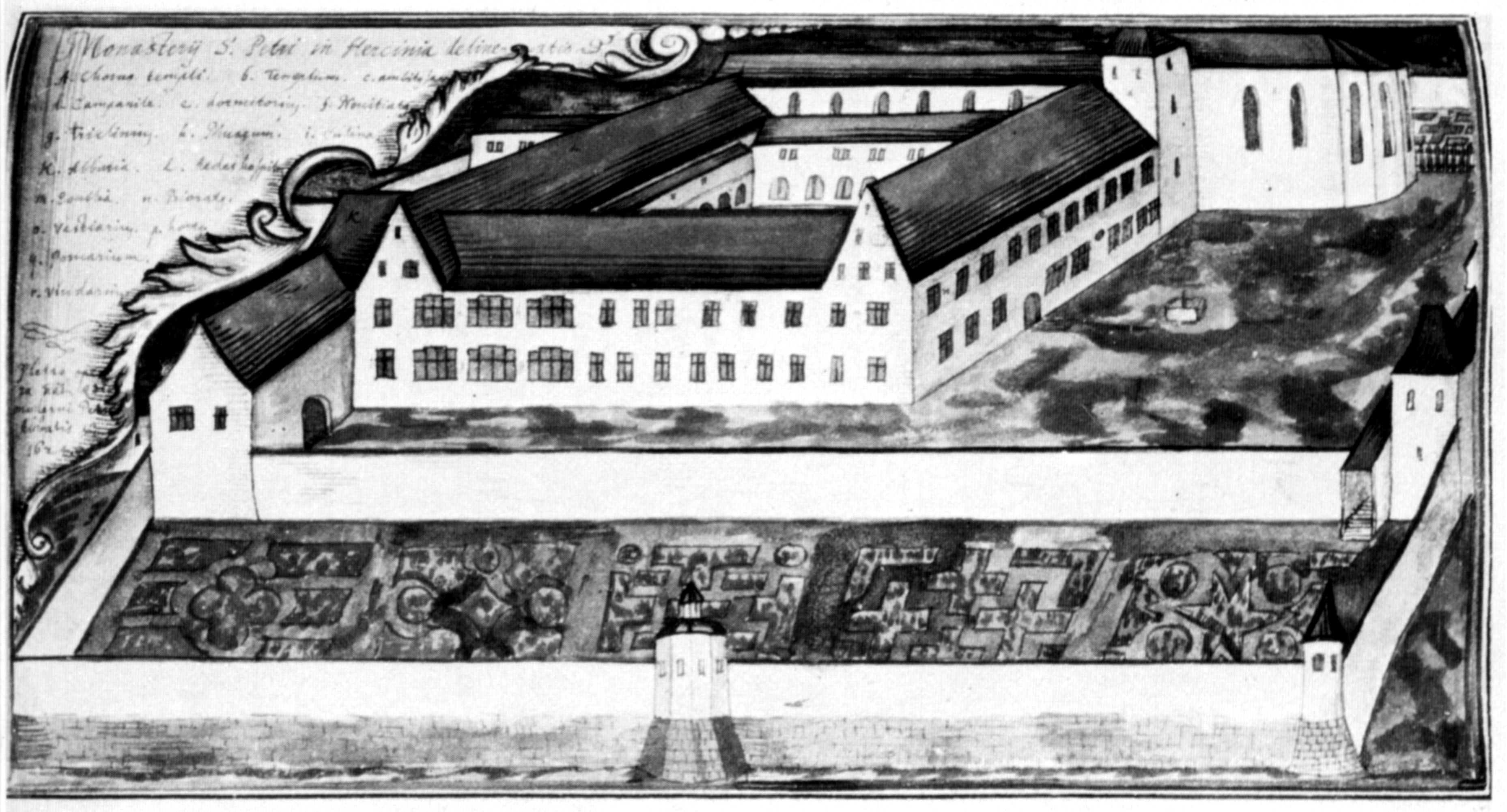 Kloster St. Peter, Kr. Breisgau-Hochschwarzwald, 1624, aus: Württembergische Landesbibliothek, HB V 4a fol 26or